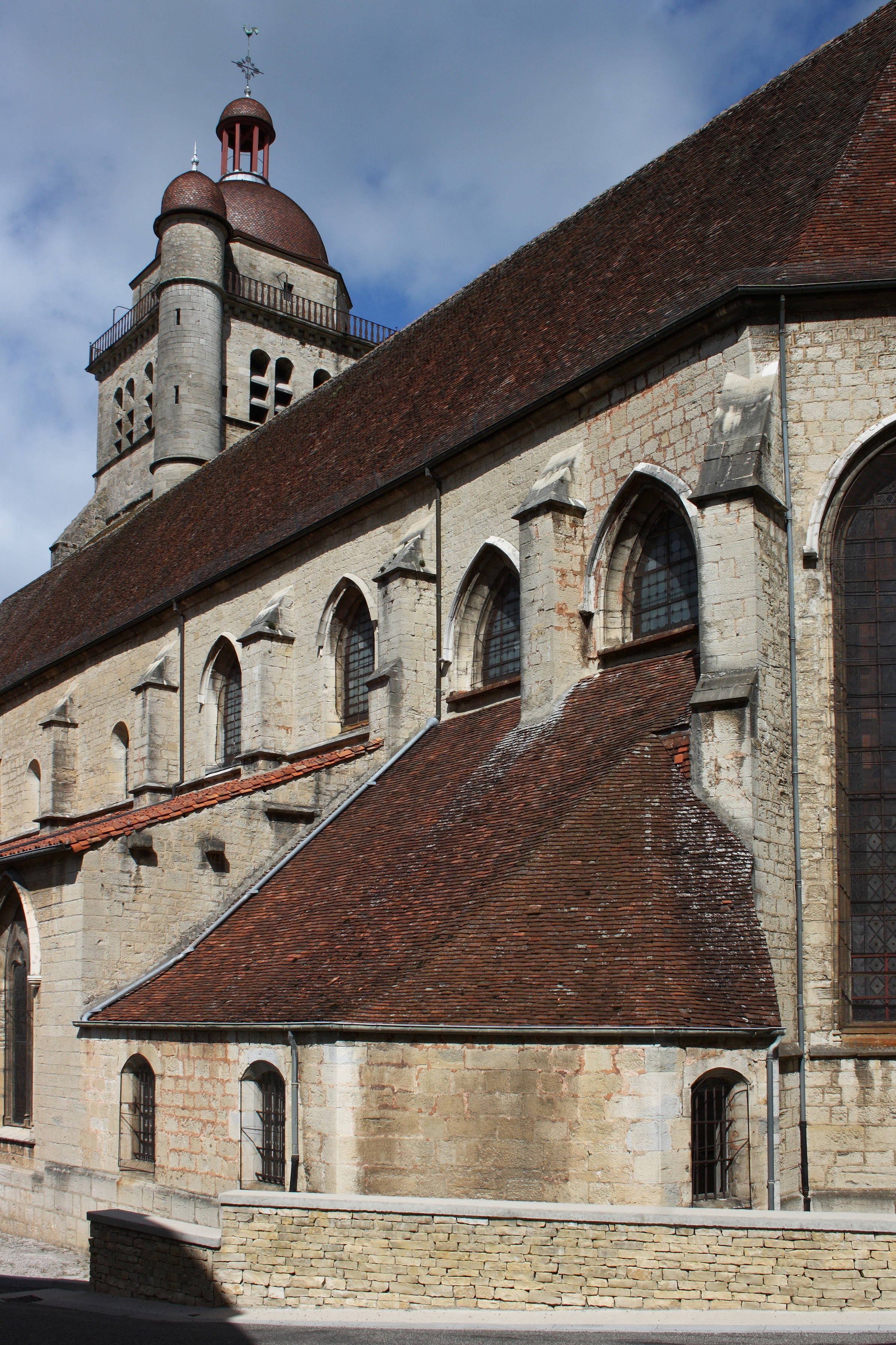 Ehemalige Kollegiatskirche St-Hippolyte in Poligny im Département Jura in der Region Franche-Comté(Frankreich), Ansicht von Südosten